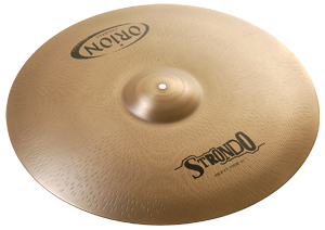 Foto de Prato de Condução Strondo da Orion